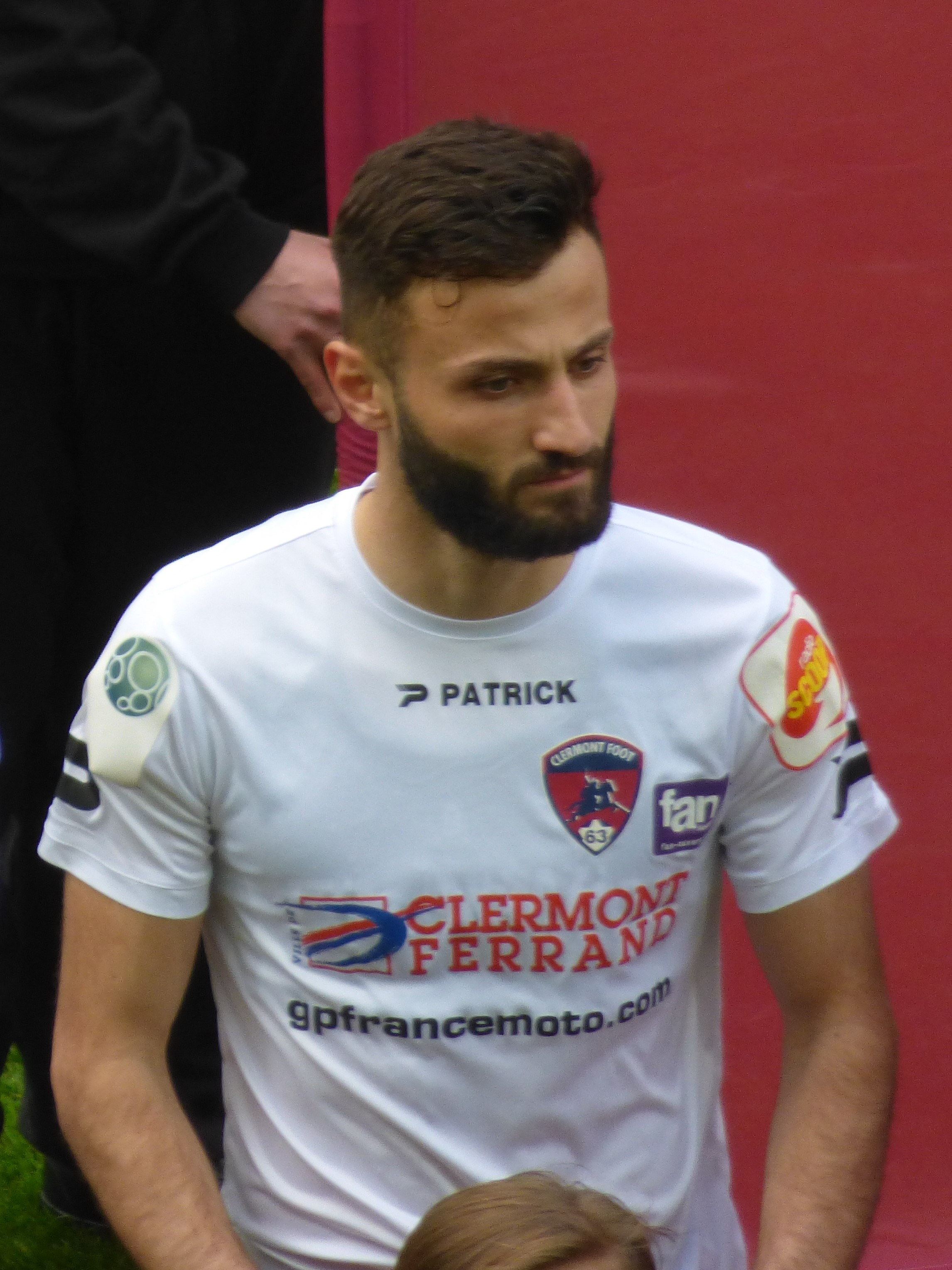 Franck Honorat avant le match RC Lens / Clermont Foot 63, comptant pour la 36ème journée du championnat de France de football de Ligue 2 2018-2019, le 4 mai 2019, au stade Bollaert-Delelis.